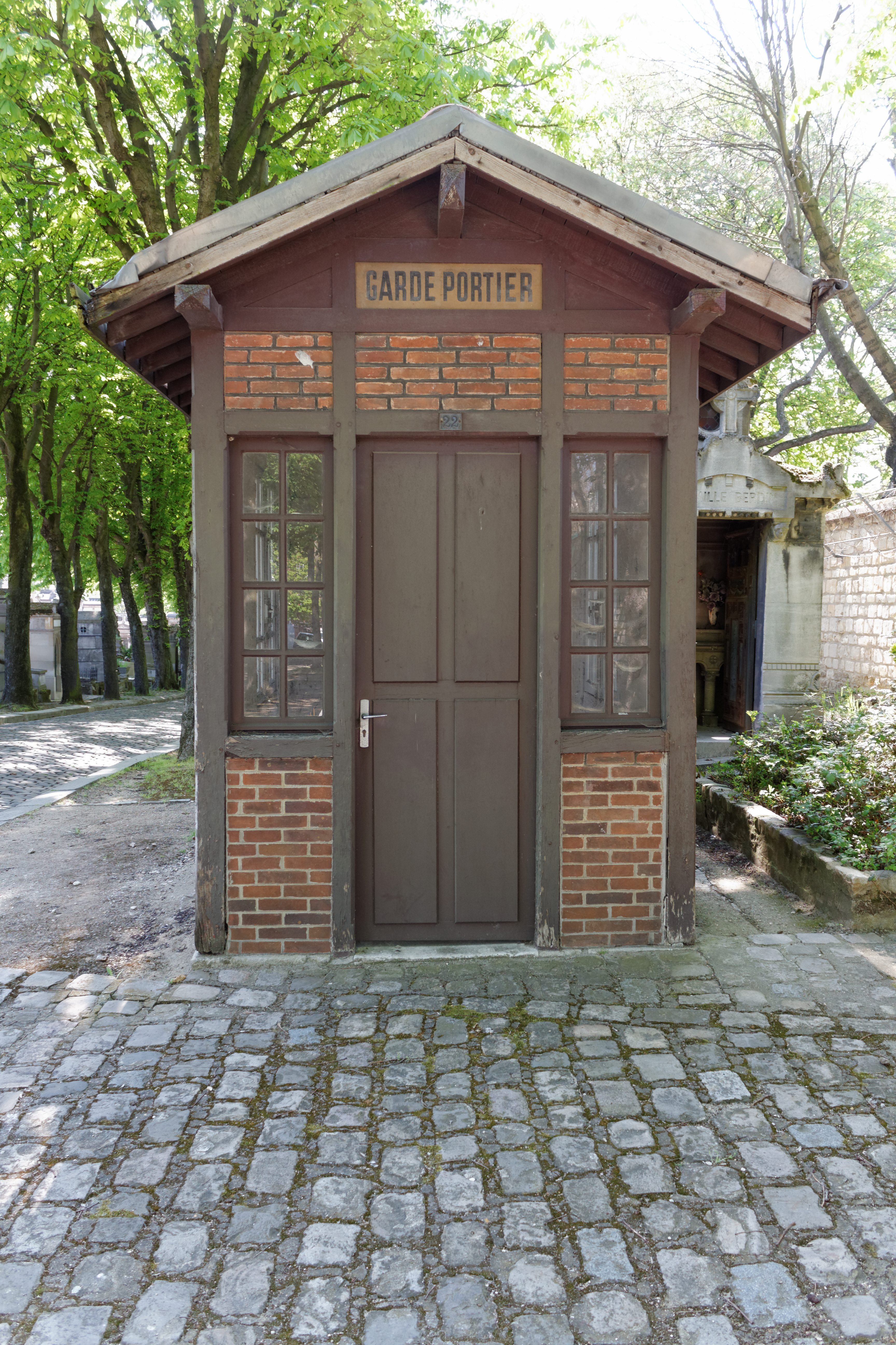 Porte piétonne à pilastres doriques et fronton percée dans le mur de soutènement du cimetière